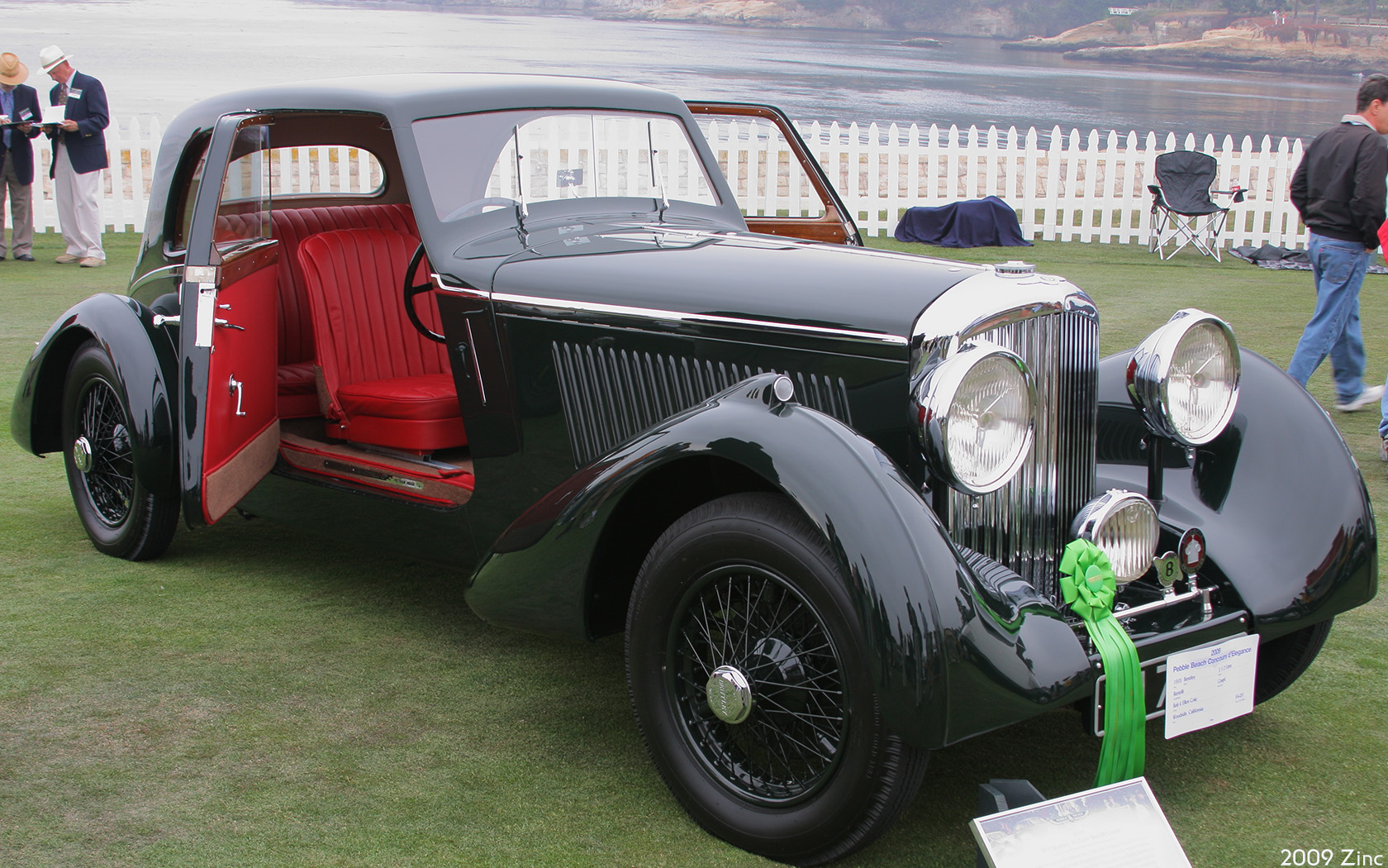 Bentley 3½ Litre Bertelli Coupé 1935 Pebble Beach Concours dElegance, Aug 16, 2009